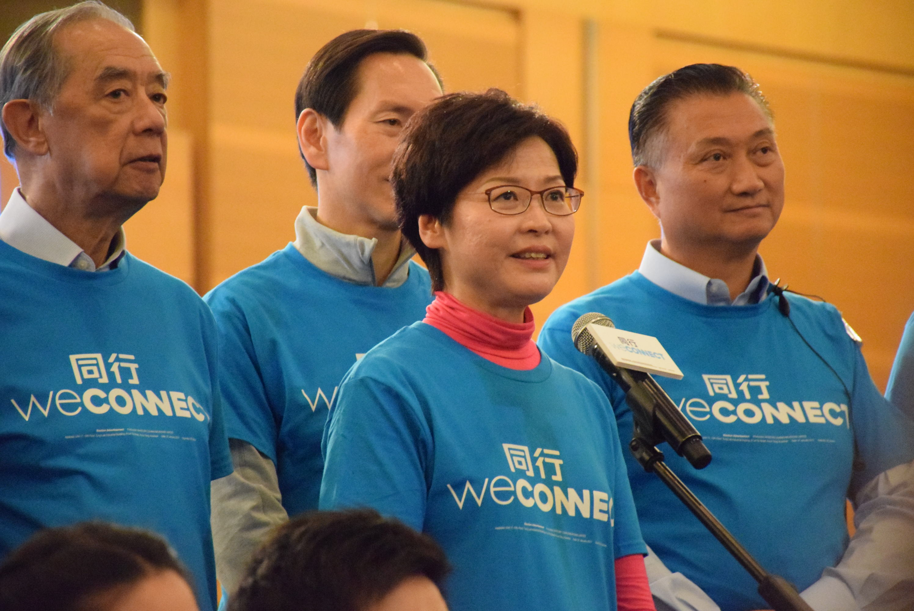 中文（香港）: 香港特首參選人林鄭月娥。